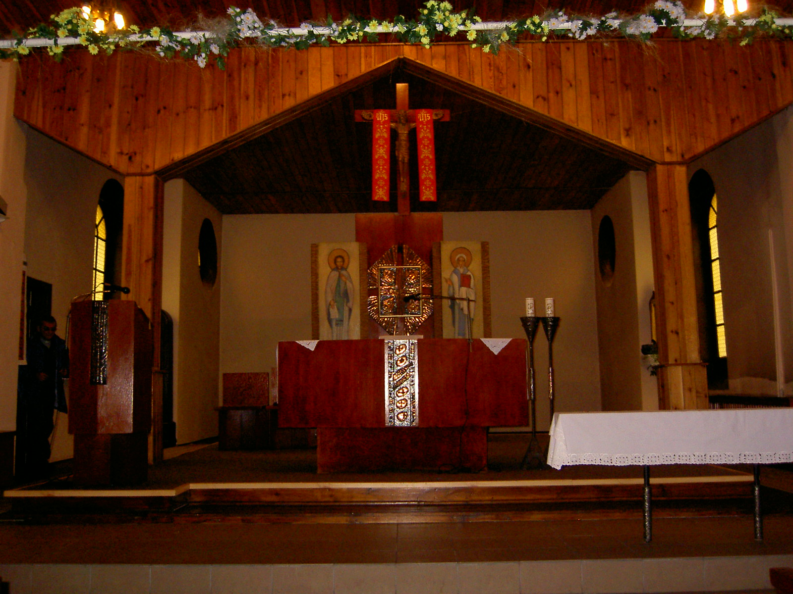 Wnetrze kościoła św. Cyryla i Metodego w Załęskiej Hałdzie - Katowice